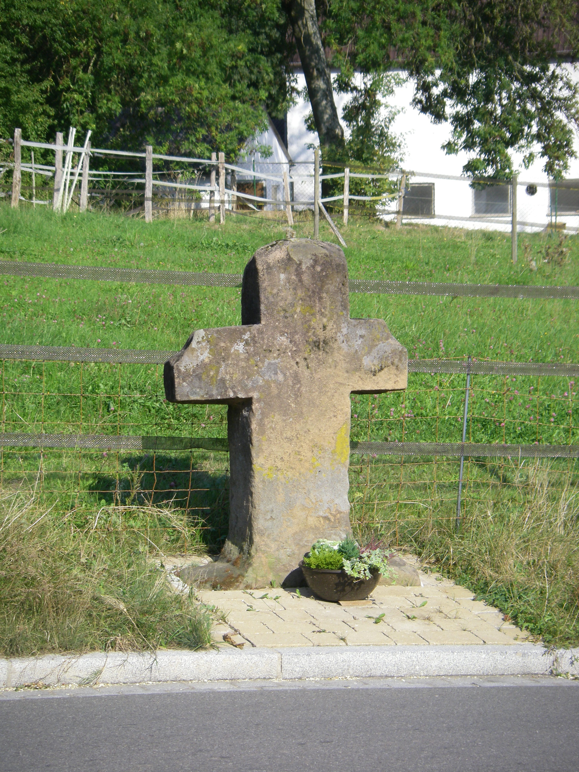 Altes Steinkreuz in Suddersdorf, Windsbach